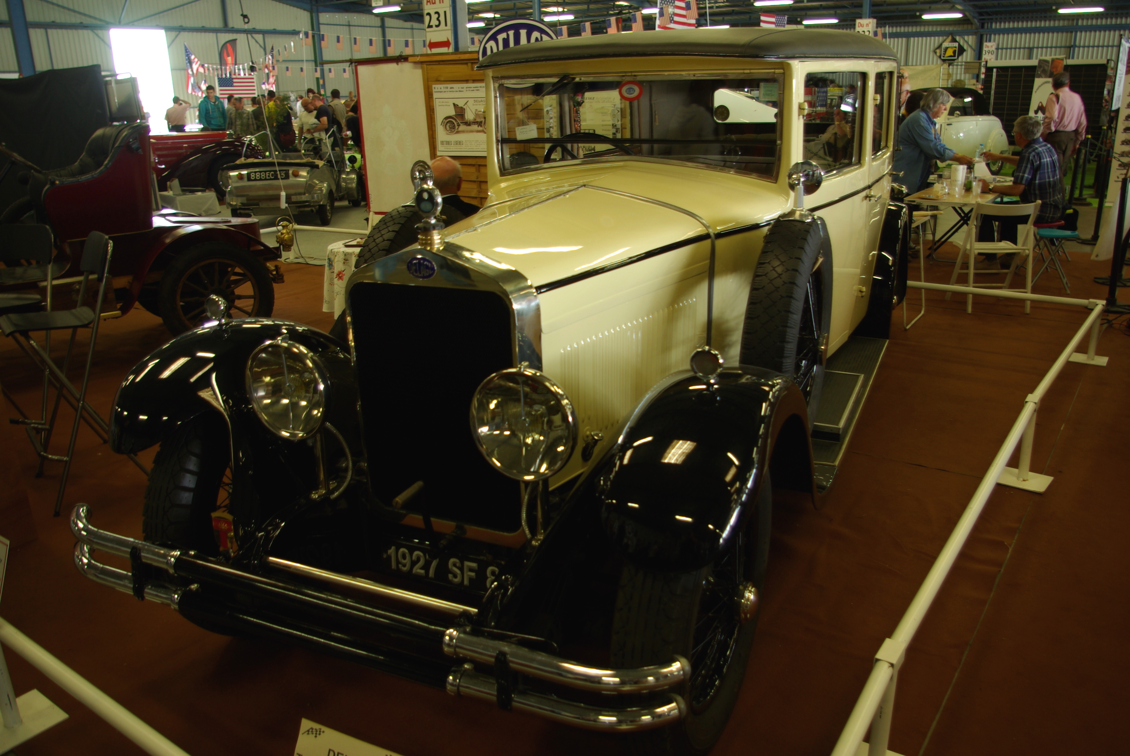 Delage DR70 1927 n°30 747. Présentée au salon Midi Auto Retro de Beauzelle (31) en 2015.